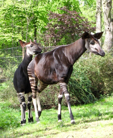 Der Kölner Zoo kann bei seinen Okapis (Okapia johnstoni) ansehnliche Zuchterfolge vorweisen.